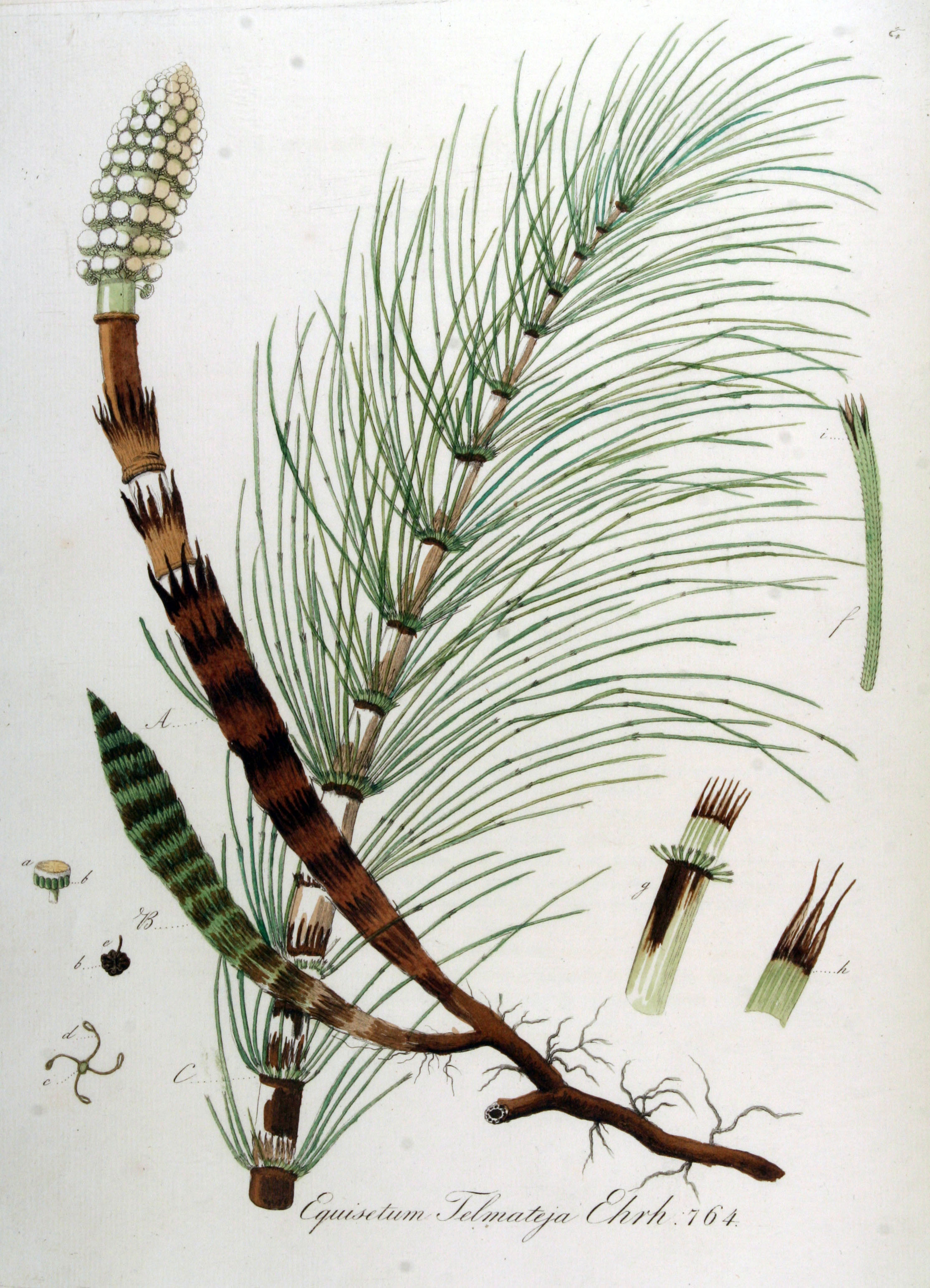 Equisetum telmateja Ehrh.